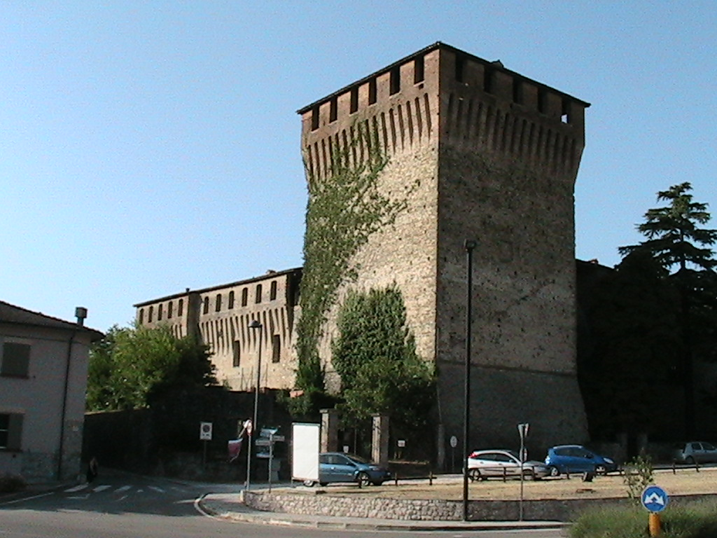 Varano de' Melegari - Castello Pallavicino